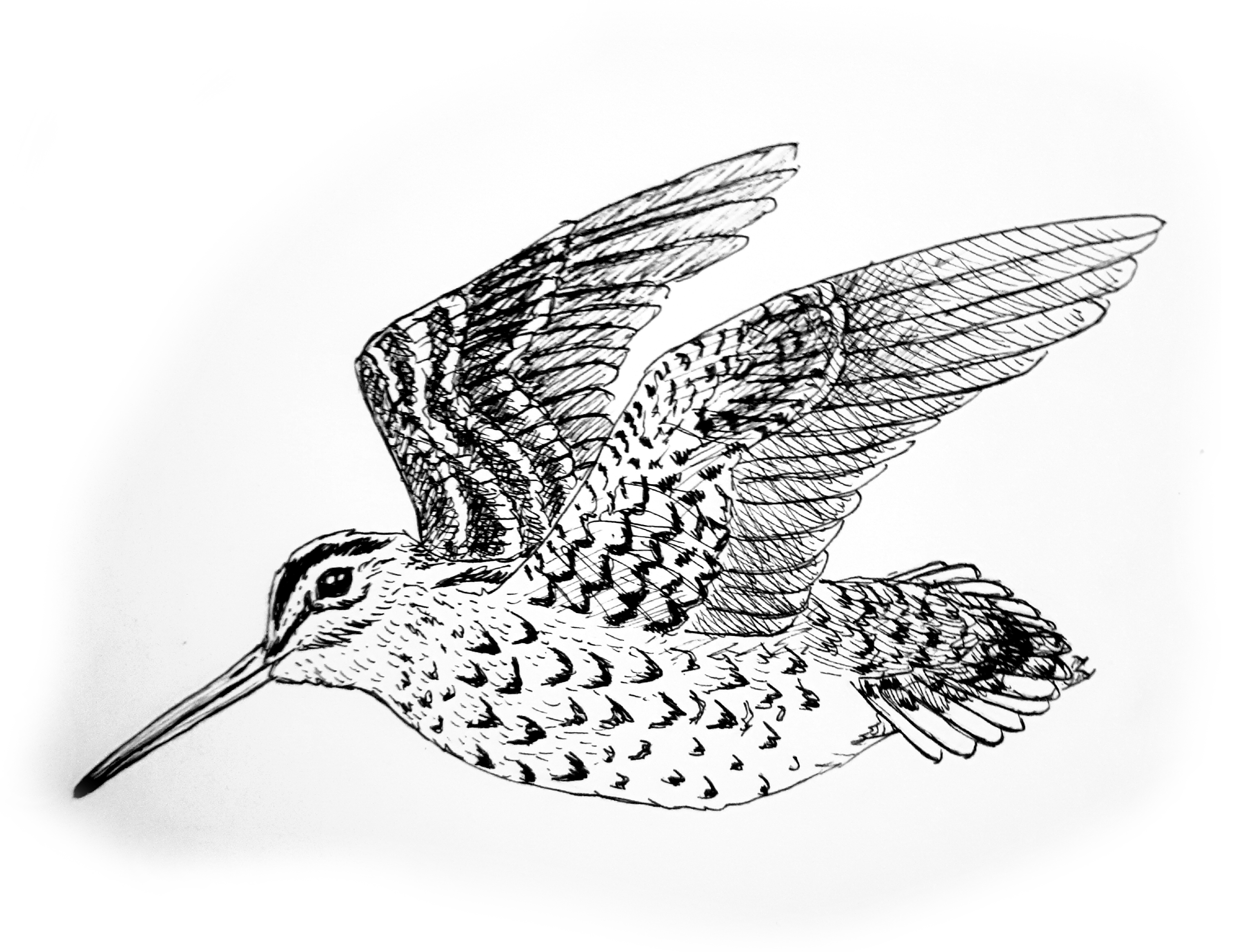 Dubelt (Gallinago media) w locie